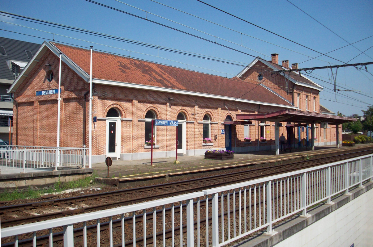 Station Beveren